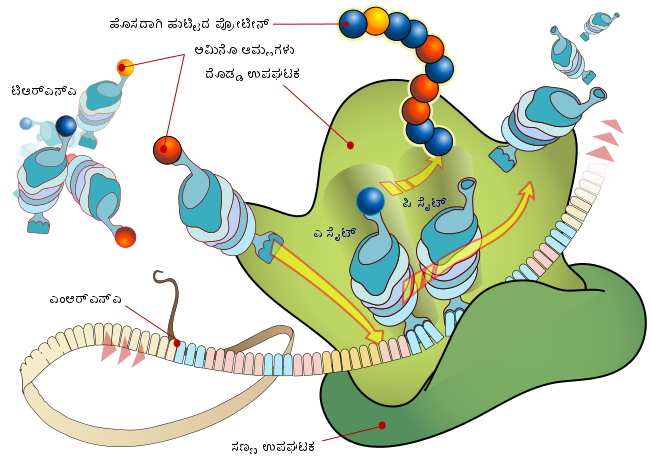 ಕನ್ನಡ: ಎಂಆರ್‌ಎನ್ಎ ಅನುವಾದ ಮತ್ತು ರೈಬೋಸೋಮ್‌ಗಳು ಪ್ರೋಟೀನ್‌ಗಳನ್ನು ಸಂಯೋಜಿಸುವ ಚಿತ್ರ